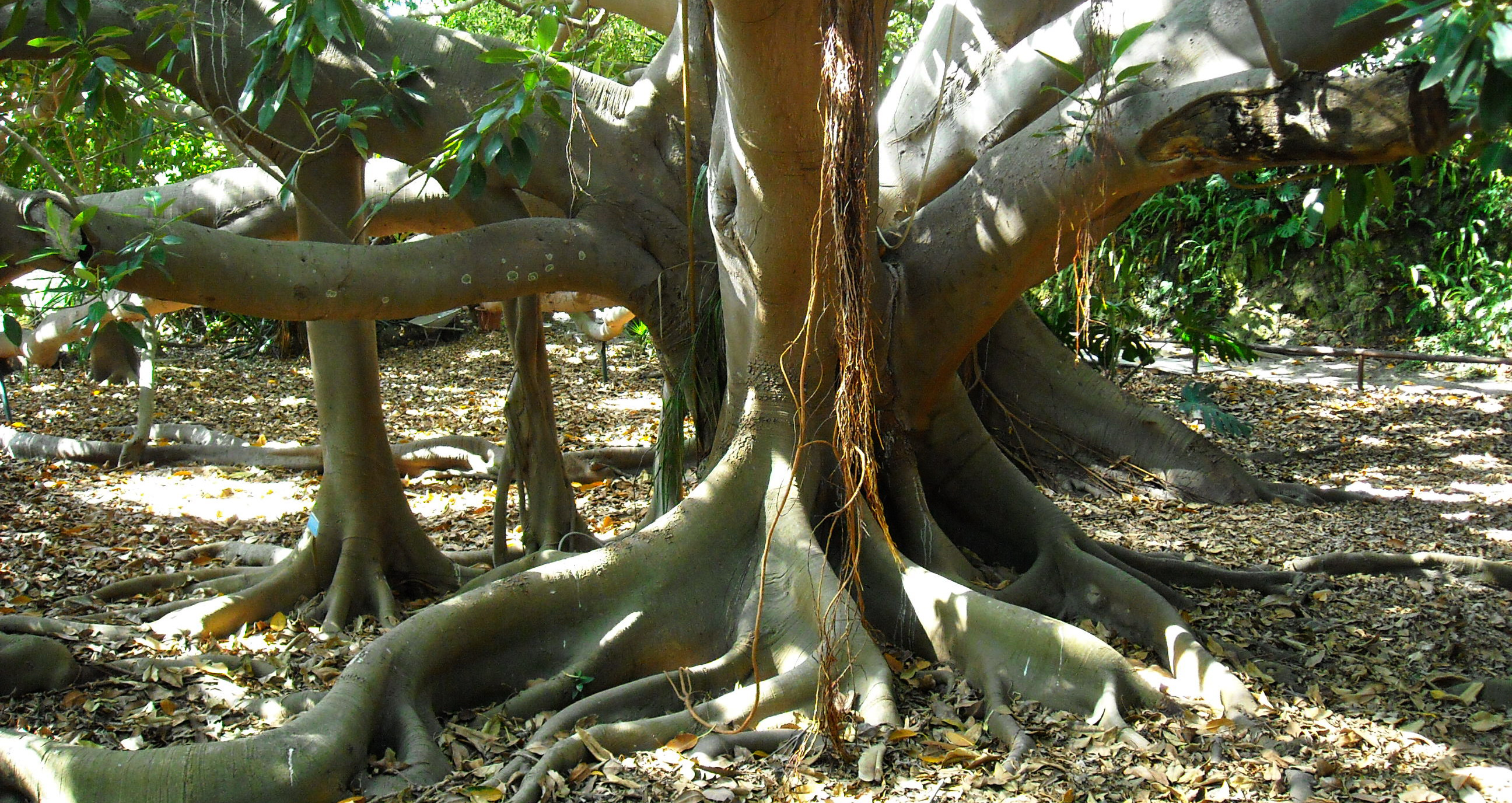 Ficus magnolia